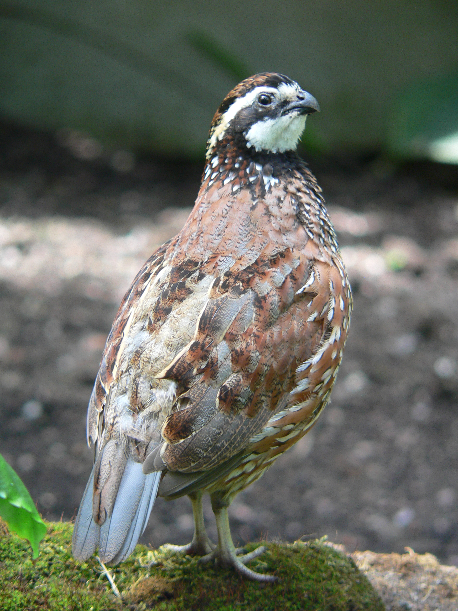 Virginia WAchtel